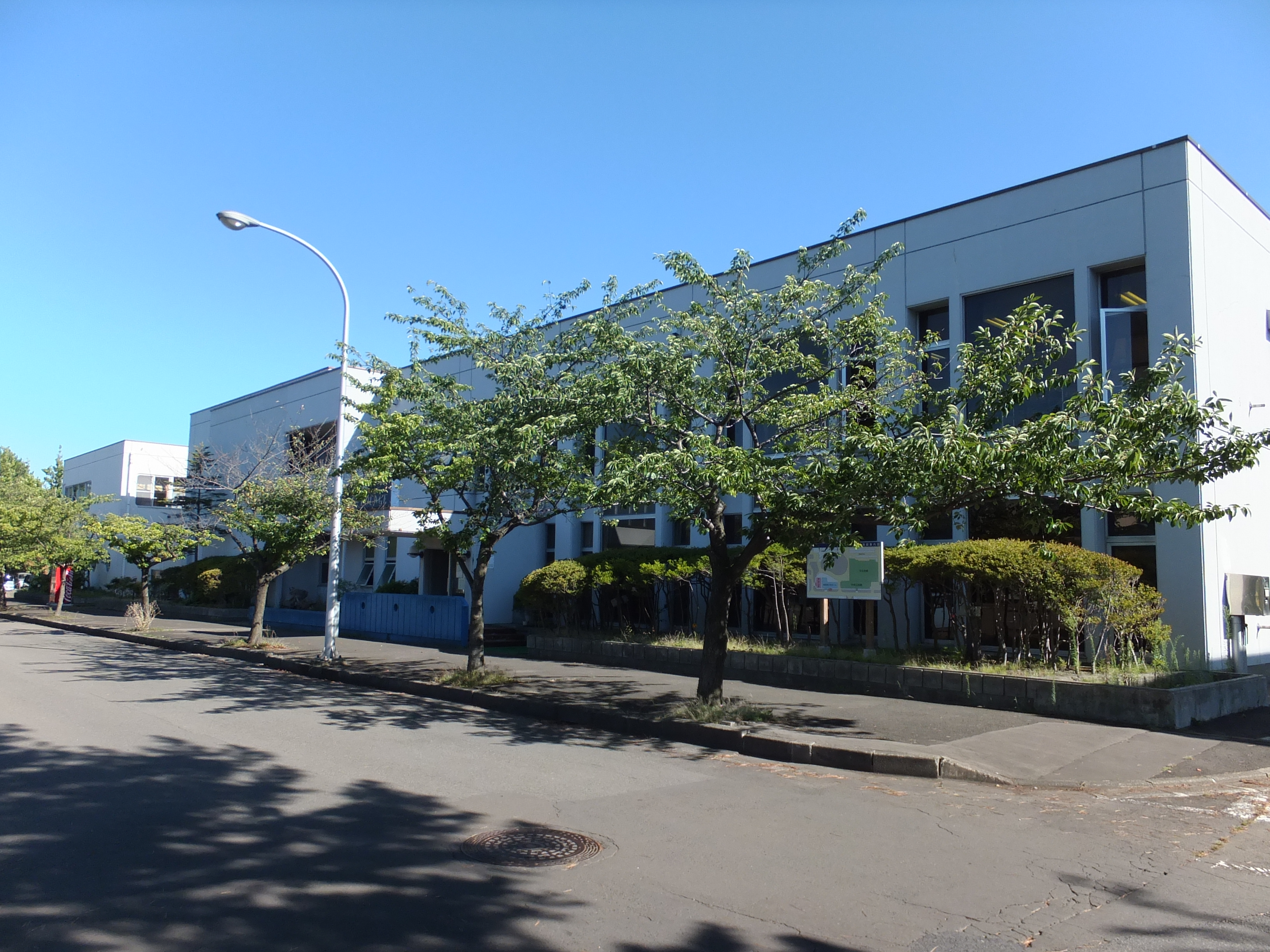 能代市勤労青少年ホーム。能代市文化会館に隣接し、ファイブラウンジという愛称がつけられている。